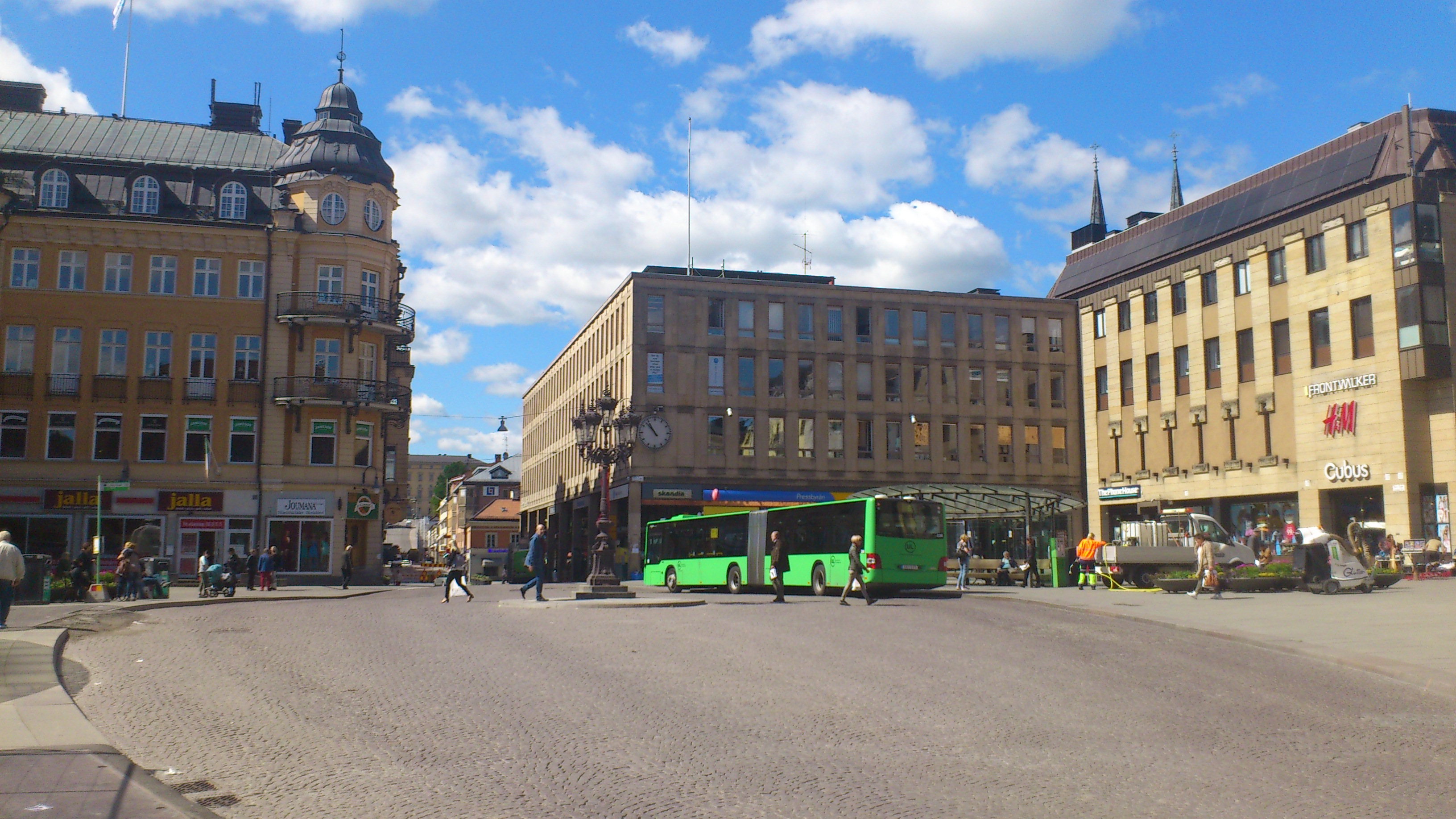 Stora torget i Uppsala sett från norra sidan